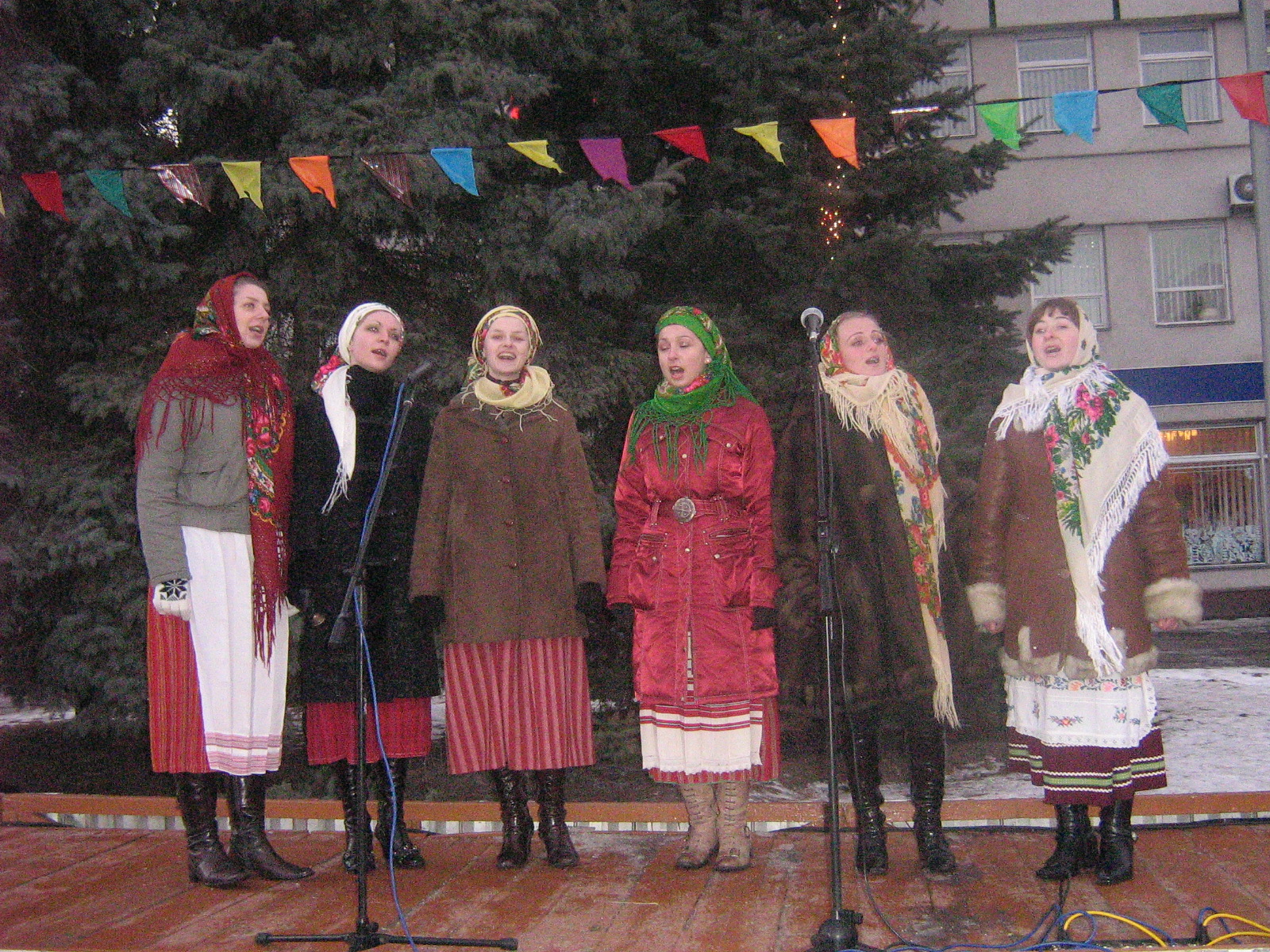 Ансамбль - учасник фестивалю "Різвяні піснеспіви"